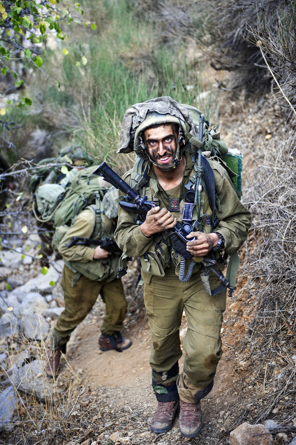 November 18, 2010. Soldiers from the Granite Battalion of the Nachal Brigade conclude a military exercise during which they practiced different scenarios, thus maintaining readiness in all fronts. היום הסתיים תרגיל של גדוד גרניט בחטיבת הנח"ל, במסגרתו אומנו הכוחות ותרגלו תרחישים שונים על מנת לשמר את מוכנותם בגזרות השונות.